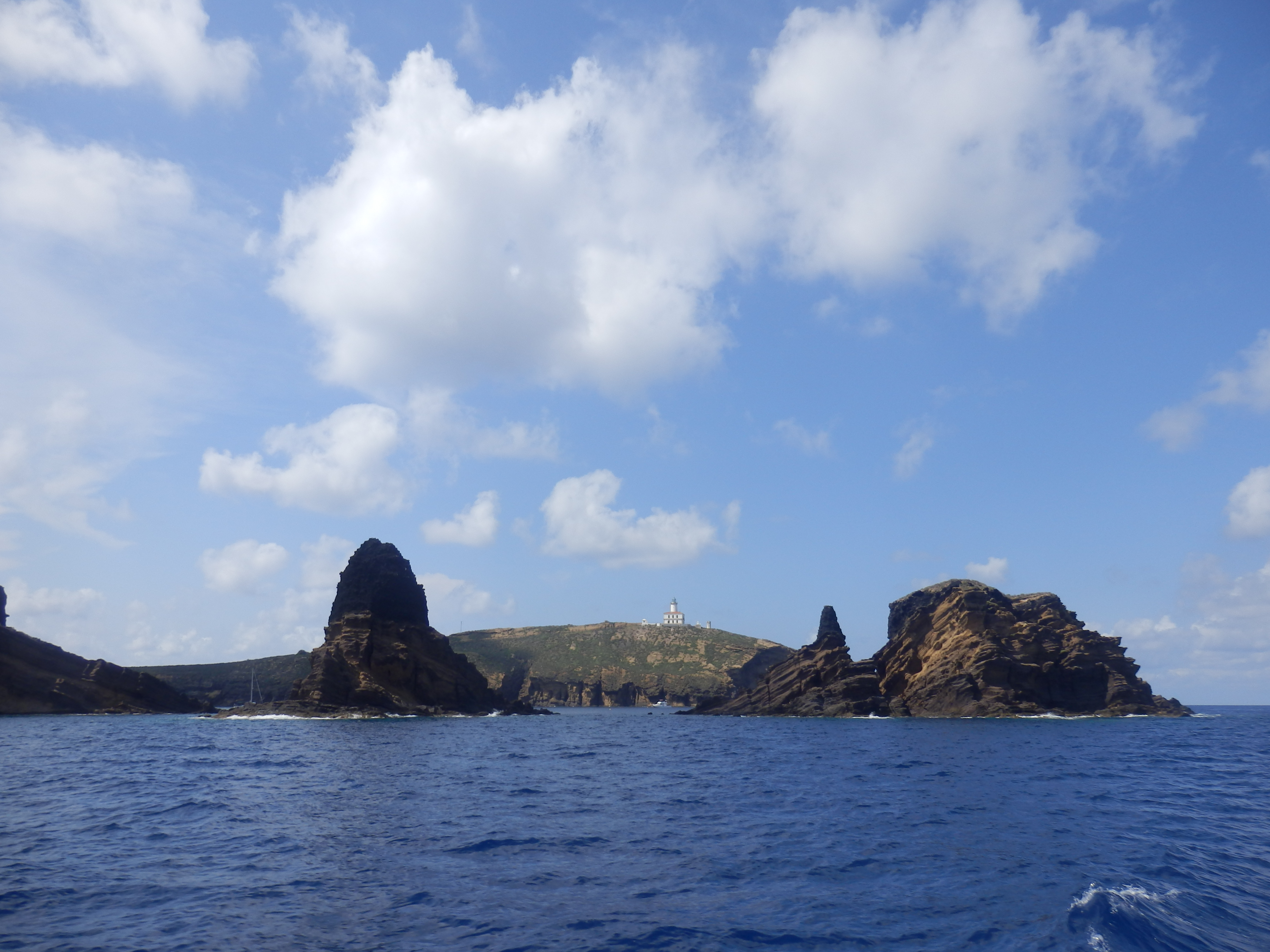 Islas Columbretes This is a photography of a Site of Community Importance in Spain with the ID: ES0000061. Natura2000 entry, EEA entry